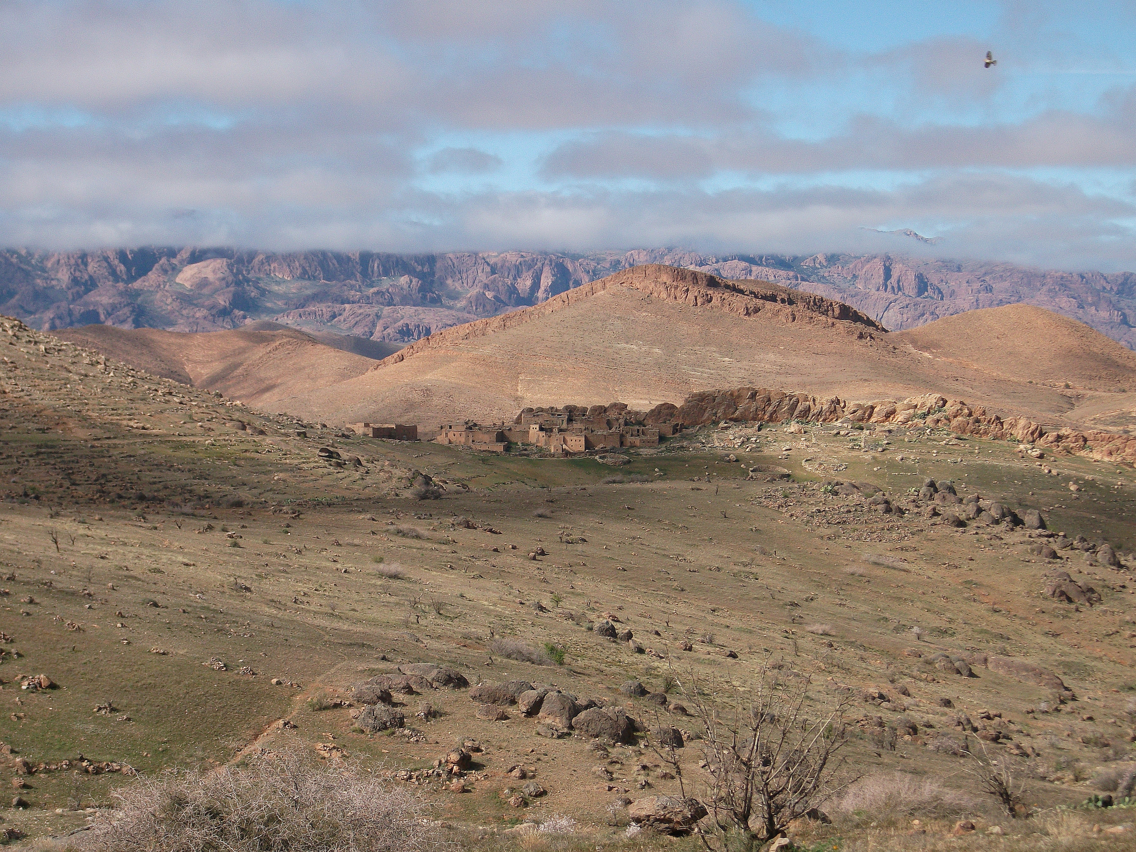 Landschaft bei Ait Abdallah, Marokko